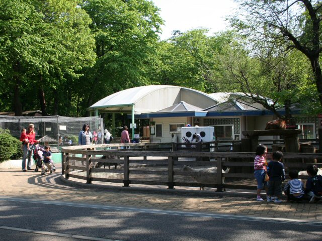 井の頭自然文化園（ヤギ舎）, Tokyo, by Kazubon, in 28 April 2006